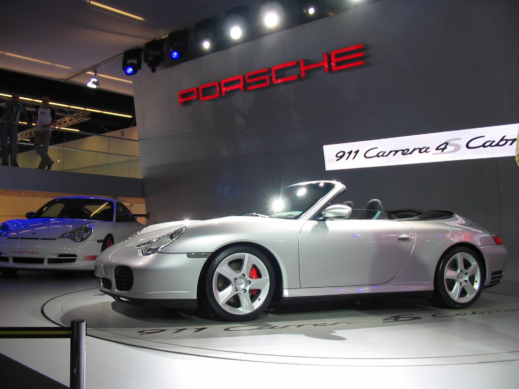 Porsche 996 Carrera 4S Cabrio